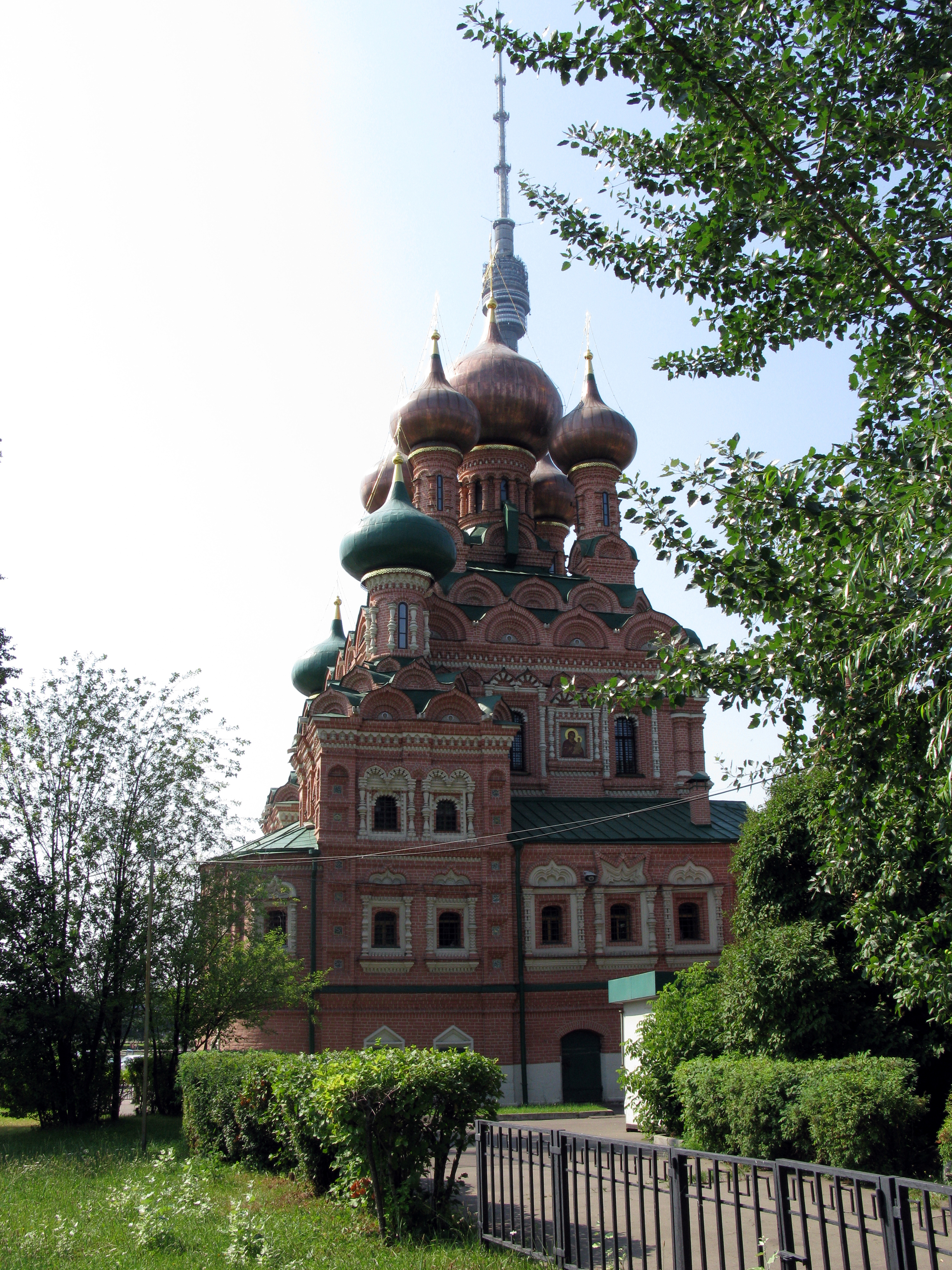 Храм Троицы Живоначальной в Останкине (Москова, ул. 1-ая Останкинская, 7.)